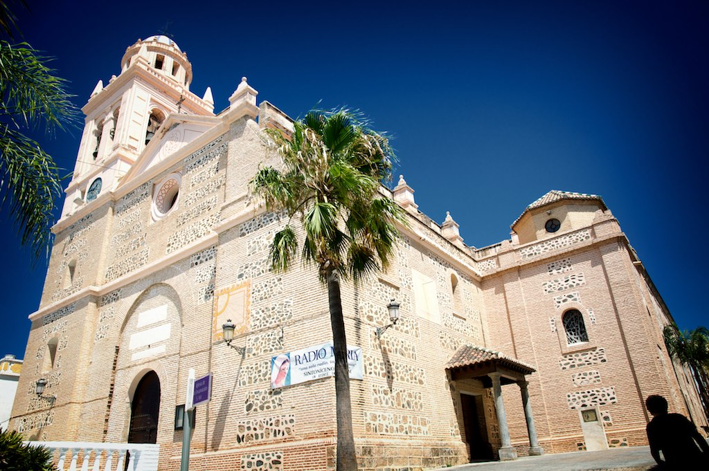 Iglesia de la Encarnación de Almuñécar (Church of Encarnation in Almuñécar), 1590-1600